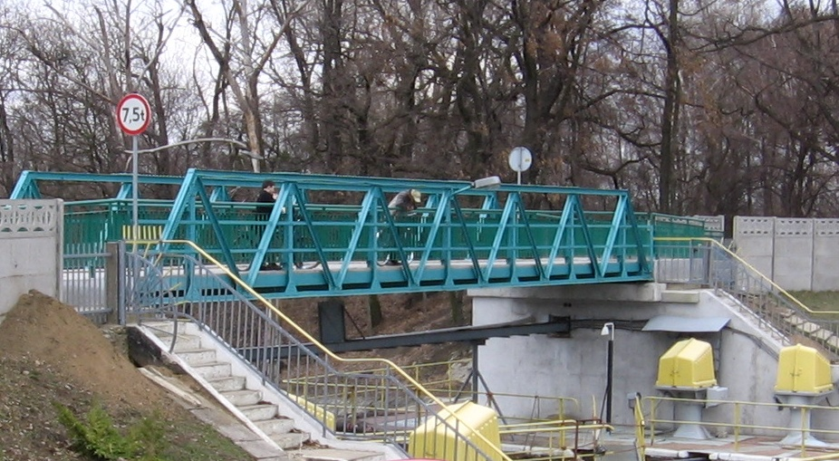 Wrocław, Poland Bartoszowicka sluice (from east)